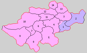 兵庫県養父郡の町村制時点の町村。